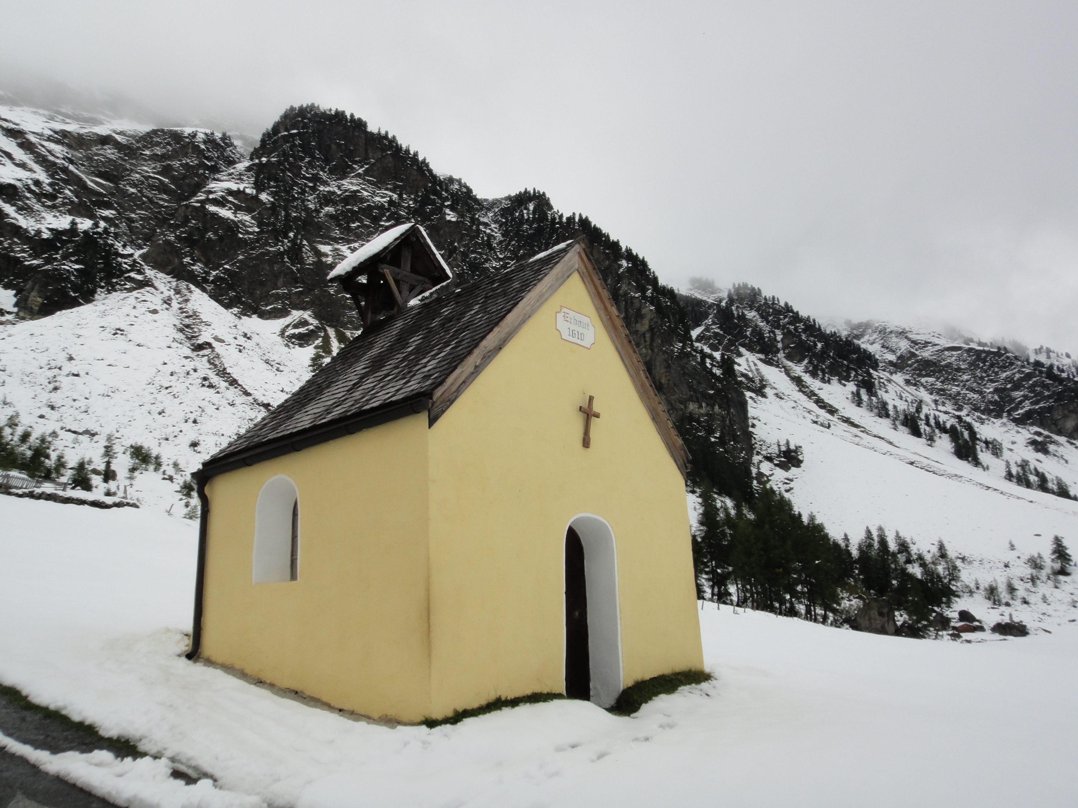 Kapelle hl. Anna, Bodenalpe, Ischgl, Tirol